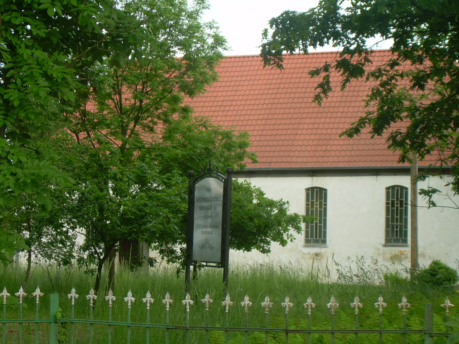 Kościół filialny pod wezwaniem świętego Józefa Oblubieńca